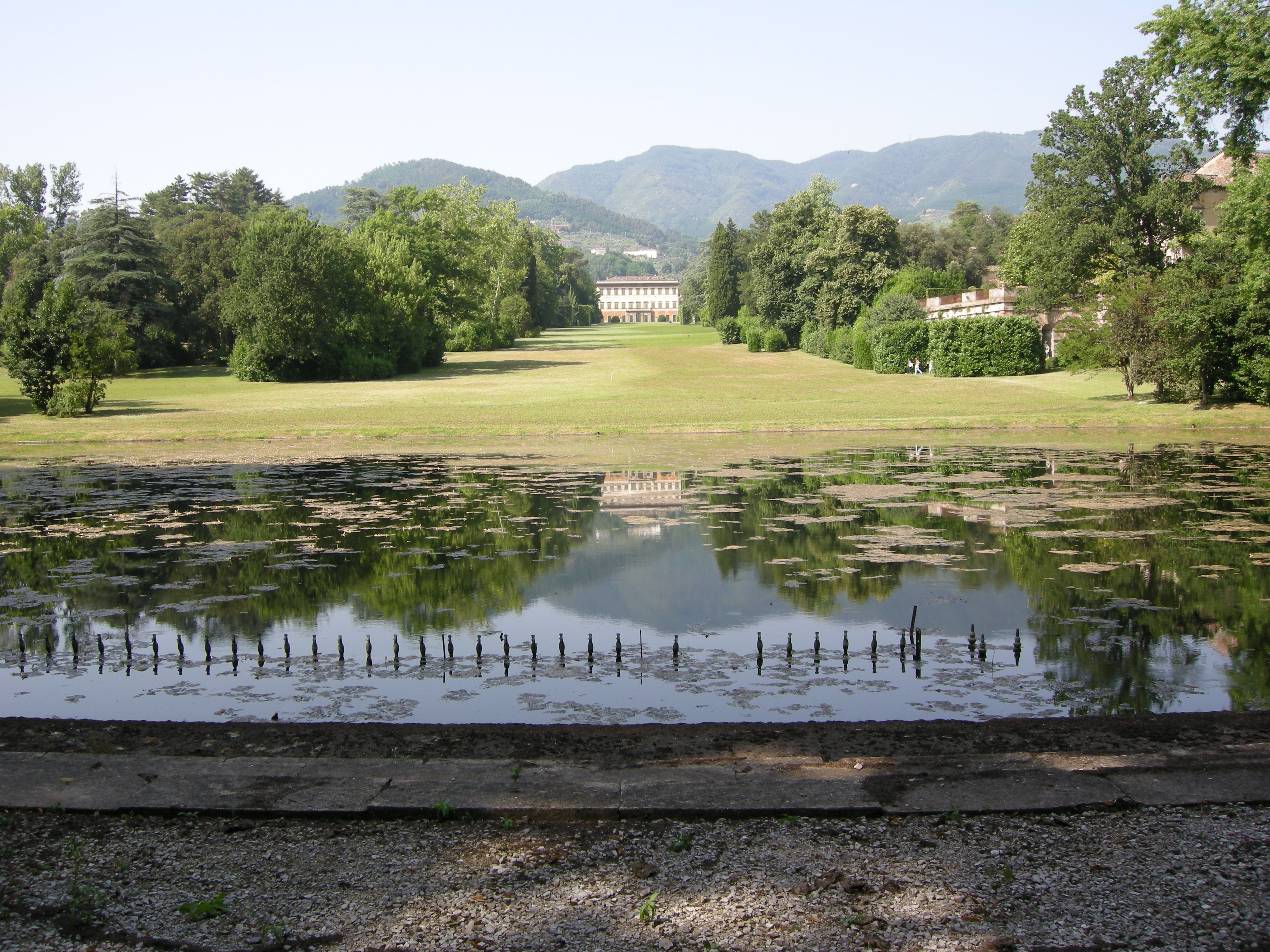 Villa reale di marlia, laghetto